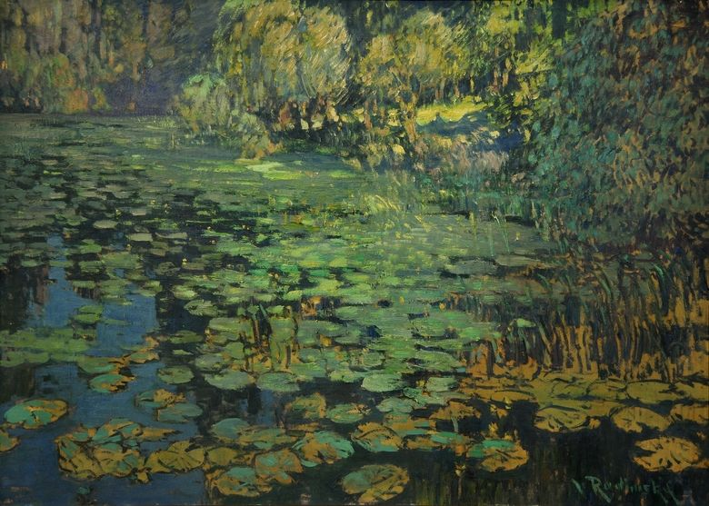 Lekníny